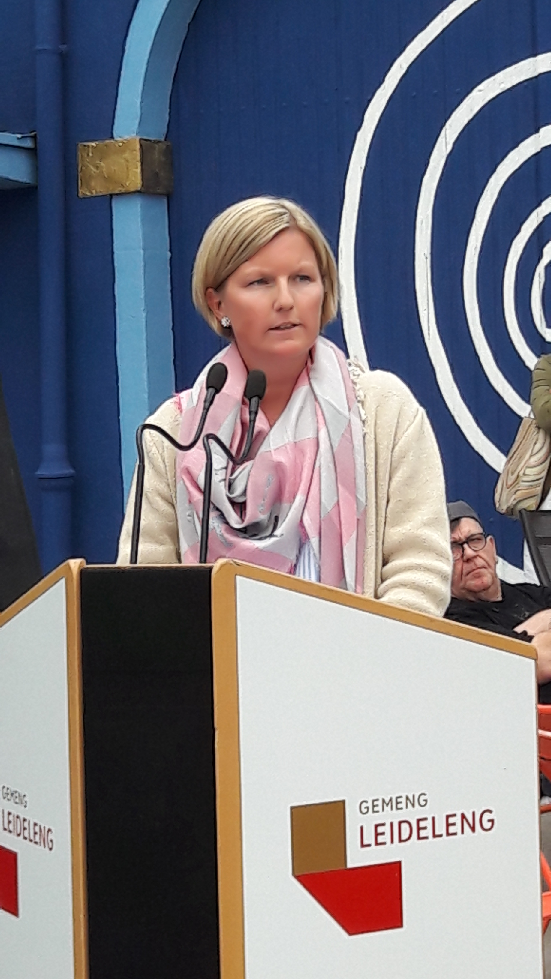 D'Buergermeeschtesch vu Leideleng Diane Feipel (2019)